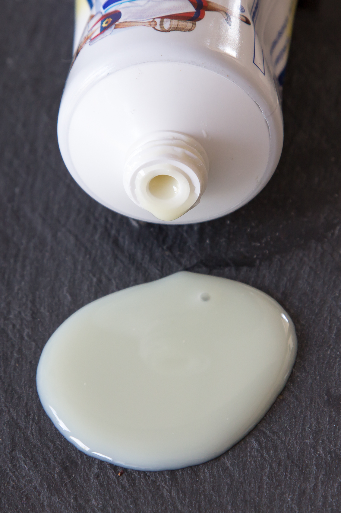 Gezuckerte Kondensmilch ("Milchmädchen") aus der Tube